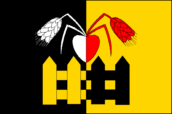 vlajka, Oplocany ,okres Přerov